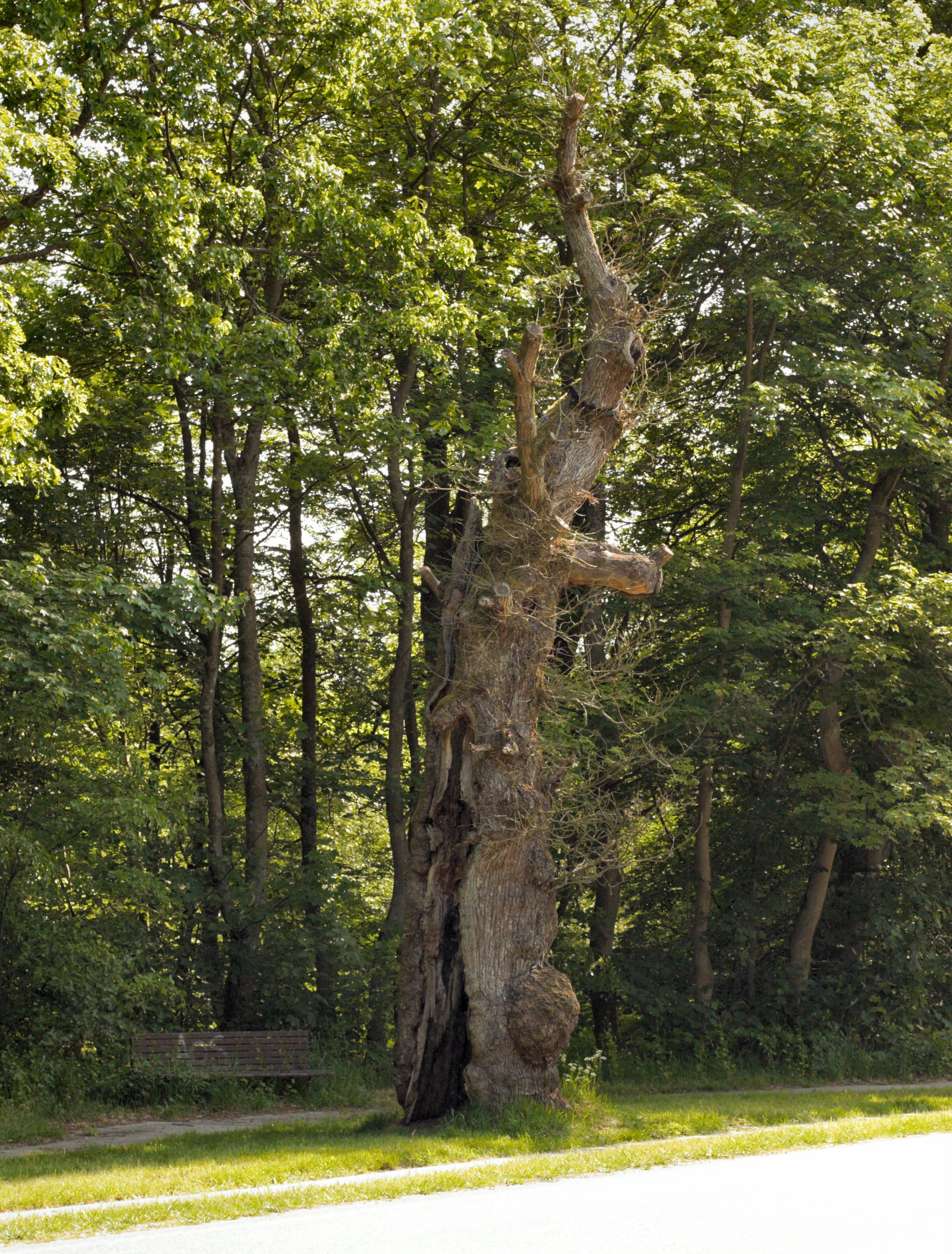 Den hule eg ved Århusbakken i Silkeborg